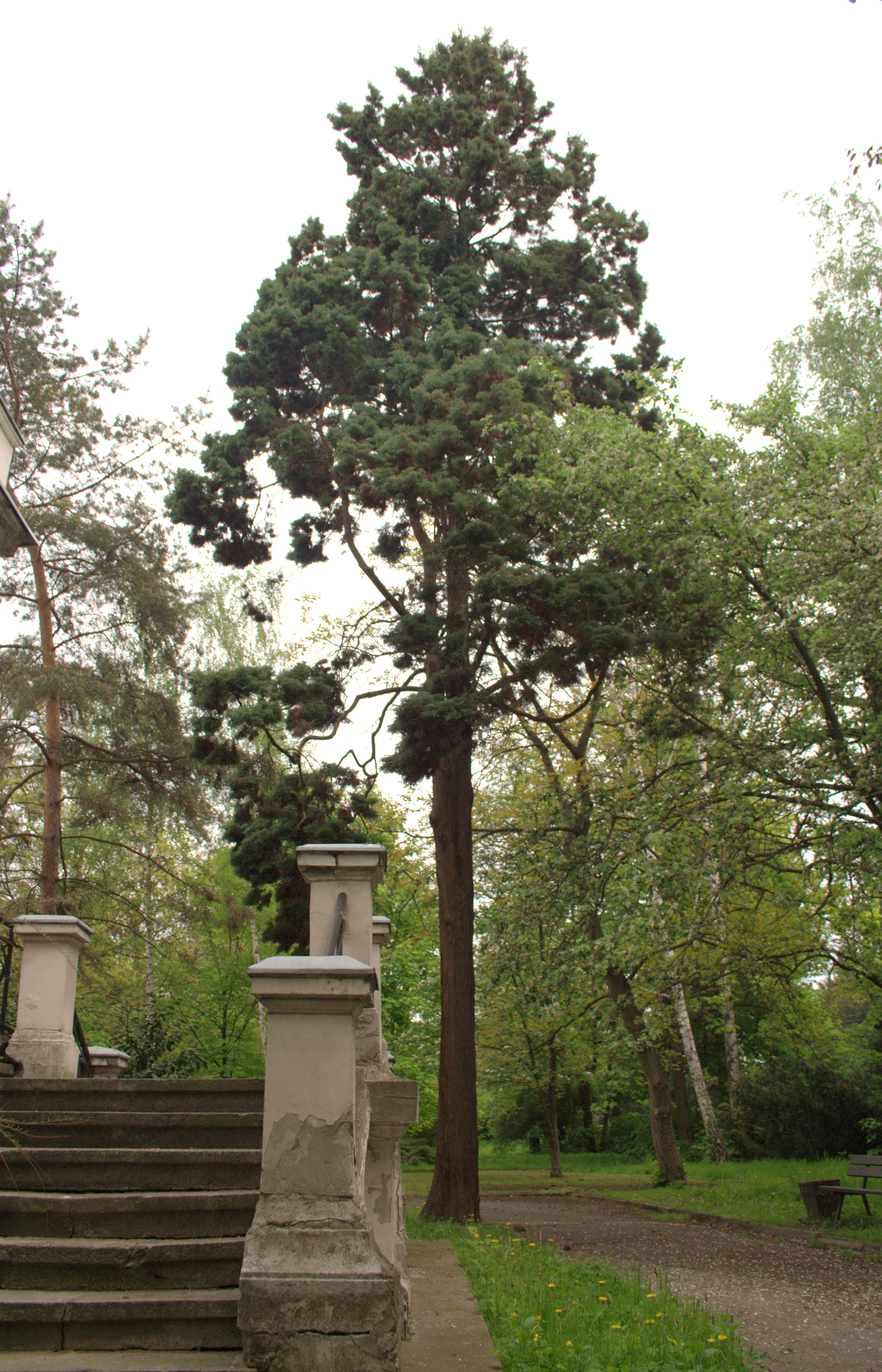 Cyprysik groszkowy Chamaecyparis pisifera 'Squarrosa' o obwodzie 124 cm przy ulicy Parkowej we Wrocławiu